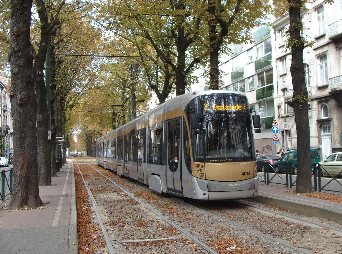 Motrice 4014 sur la ligne 3 vers l'Esplanade, arrêt Berkendael (avenue Albert, Uccle)